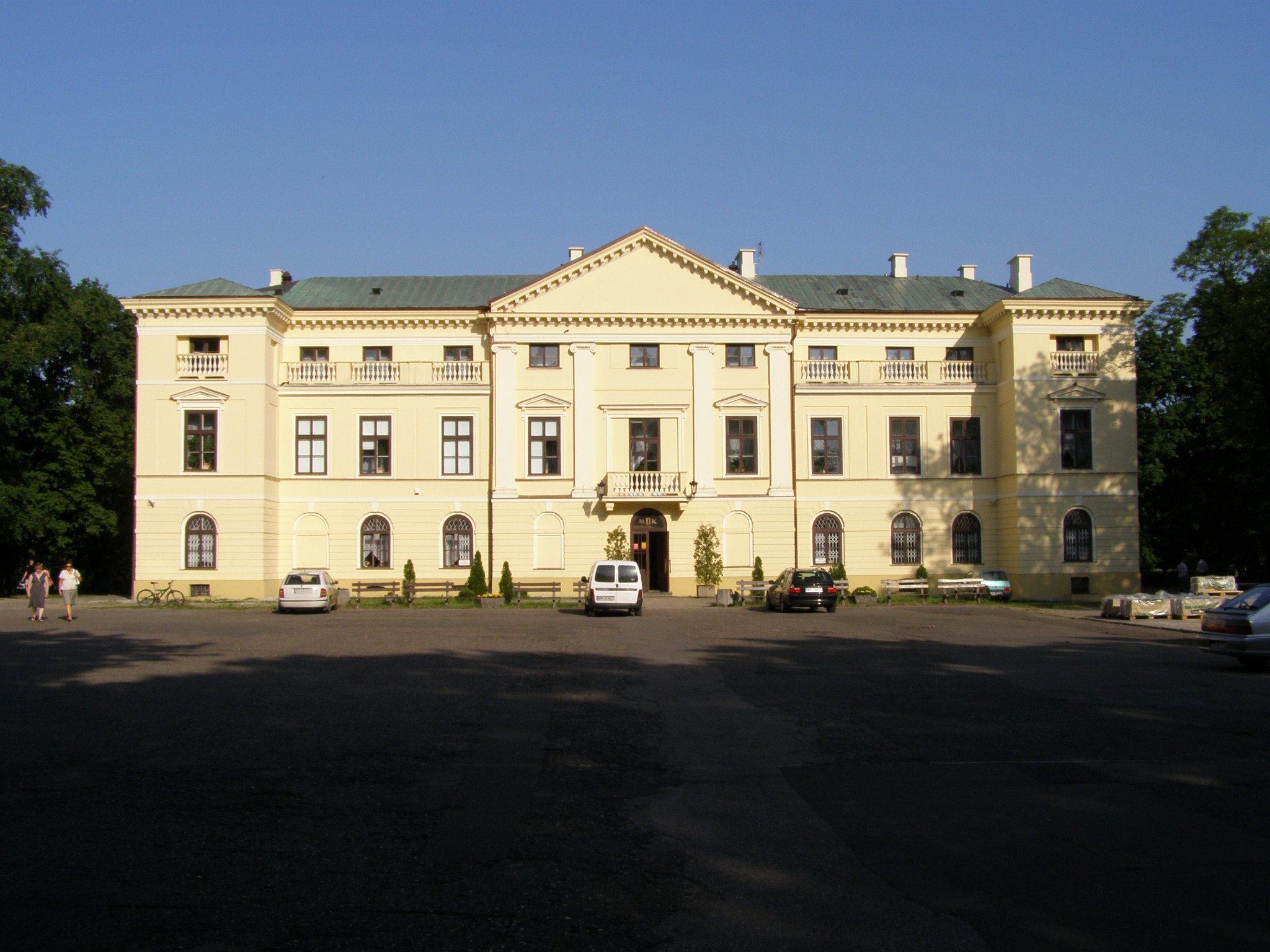 Palace of Doria Dernałowicz Family in Mińsk Mazowiecki